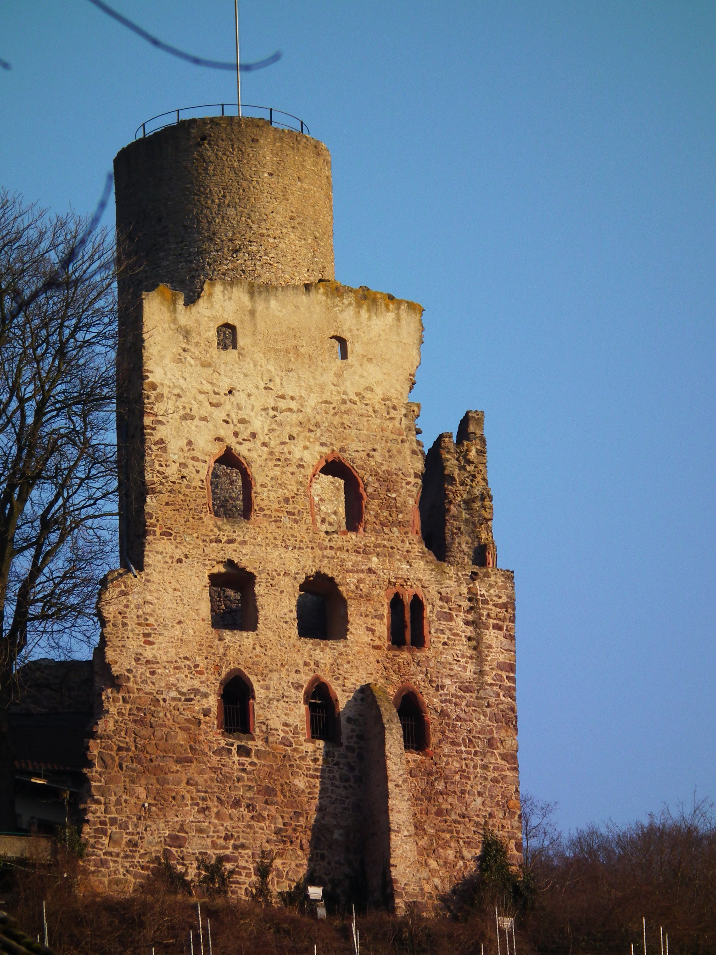 Strahlenburg in Schriesheim (Baden-Württemberg, Deutschland)